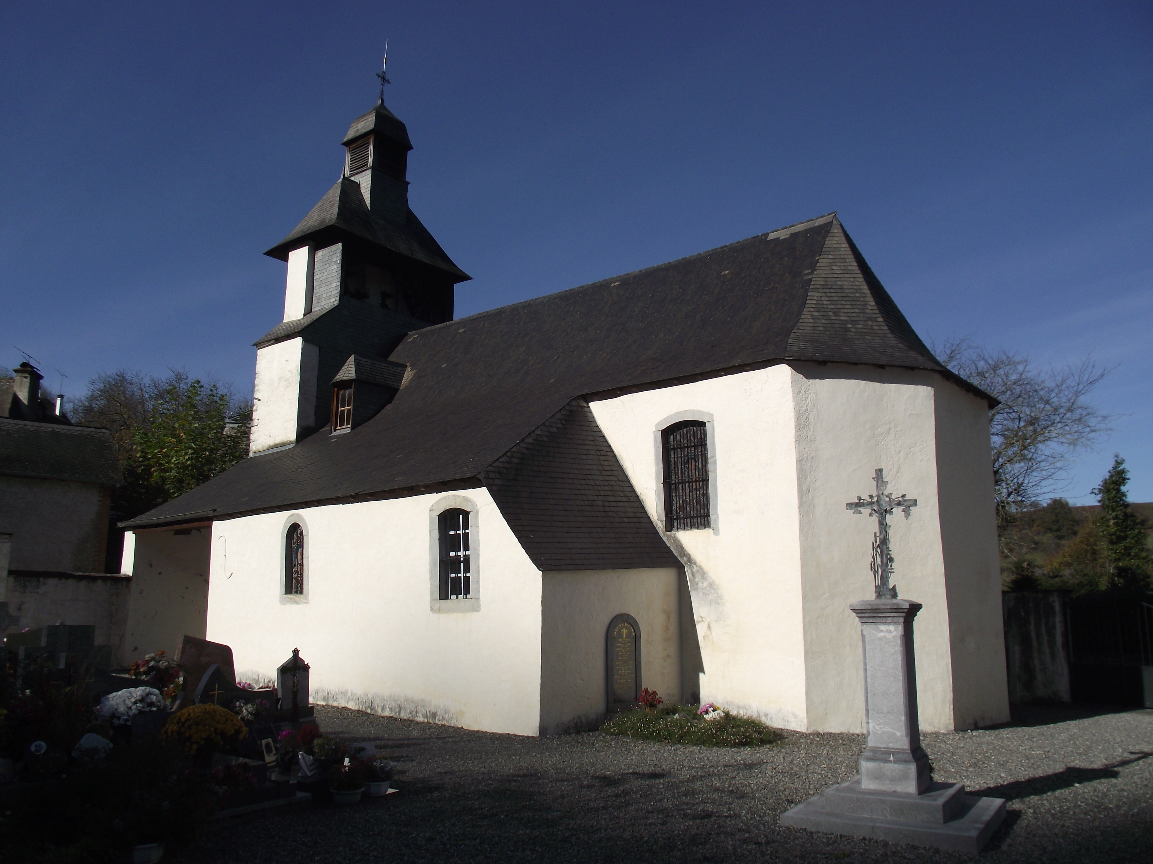 Église Saint-Étienne des Angles (Hautes-Pyrénées, France)